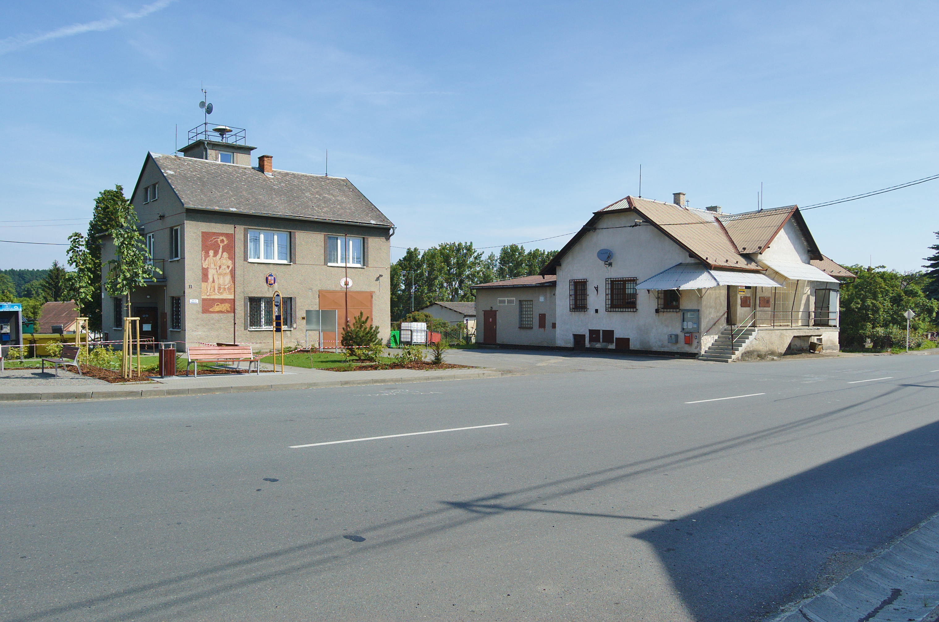 Náves, Slavětín, okres Olomouc